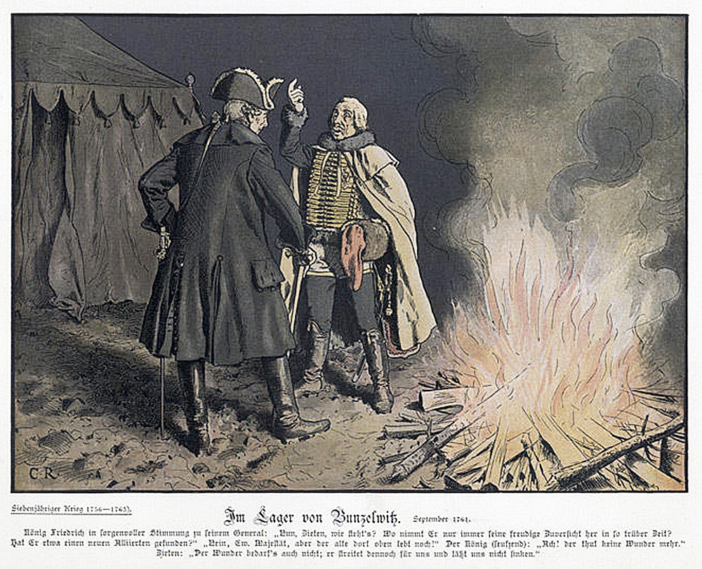 Friedrich der Große und Zieten im Lager von Bunzelwitz. Text: Im Lager von Bunzelwitz. September 1781. König Friedrich in sorgenvoller Stimmung zu seinem General: "Nun, Zieten, wie steht´s? Wo nimmt Er nur immer seine freudige Zuversicht her in so trüber Zeit? Hat Er etwa einen neuen Alliierten gefunden?" Nein, Ew. Majestät, aber der alte dort oben lebt noch!" Der König (seufzend): "Ach! der thut keine Wunder mehr." Zieten: "Der Wunder bedarf`s auch nicht; er streitet dennoch für uns und läßt uns nicht sinken."